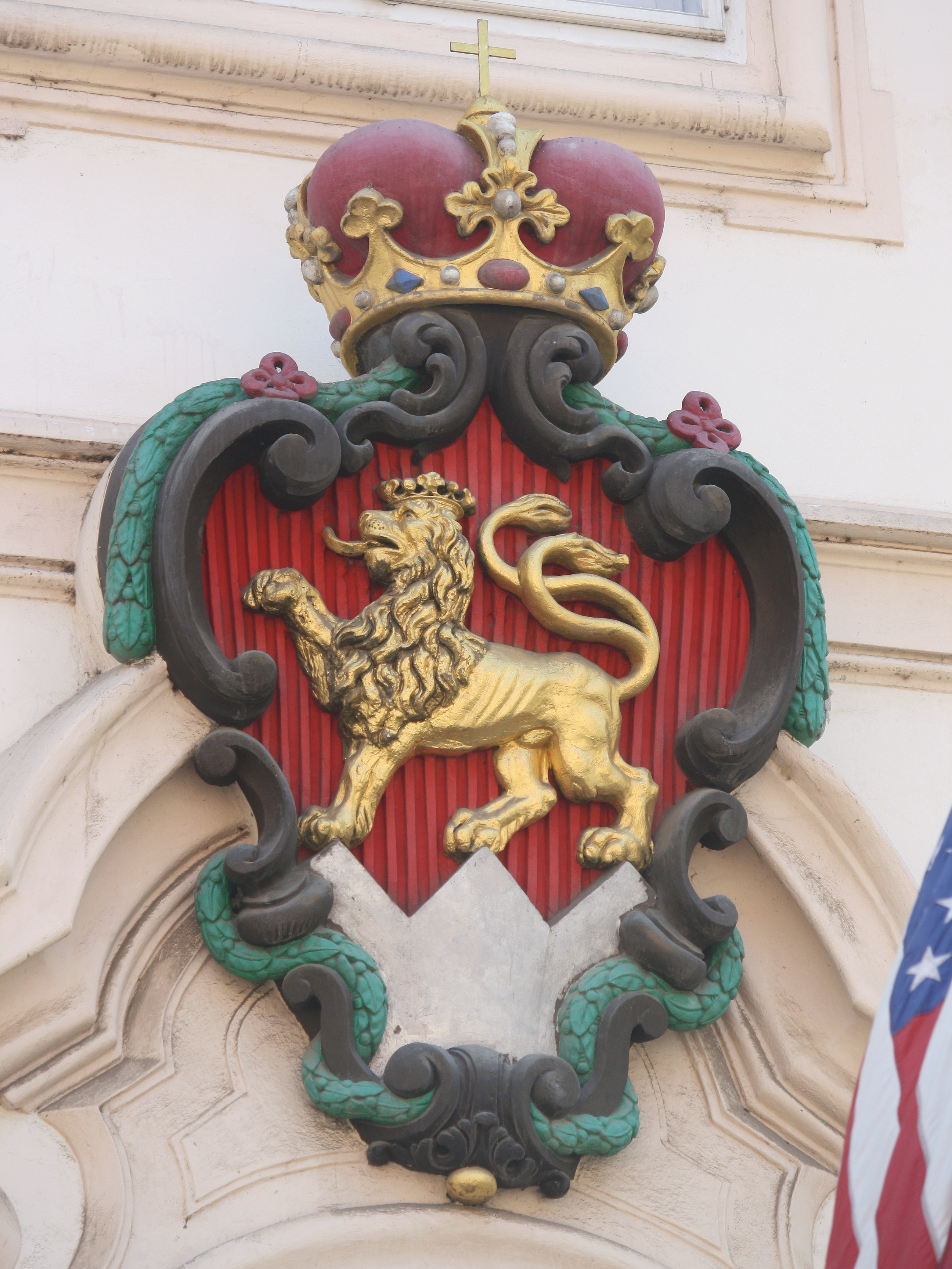 erb